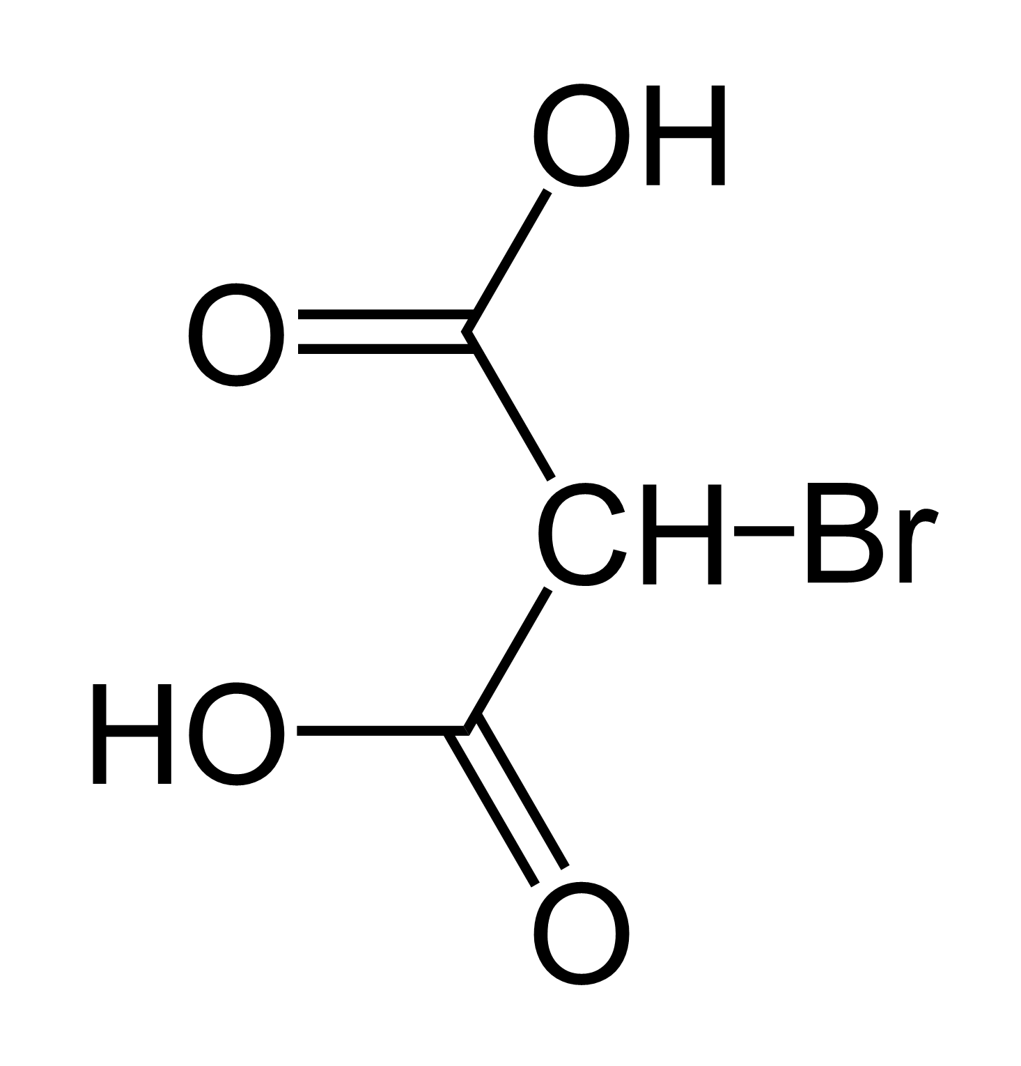 Bromierte Malonsäure, Strukturformel